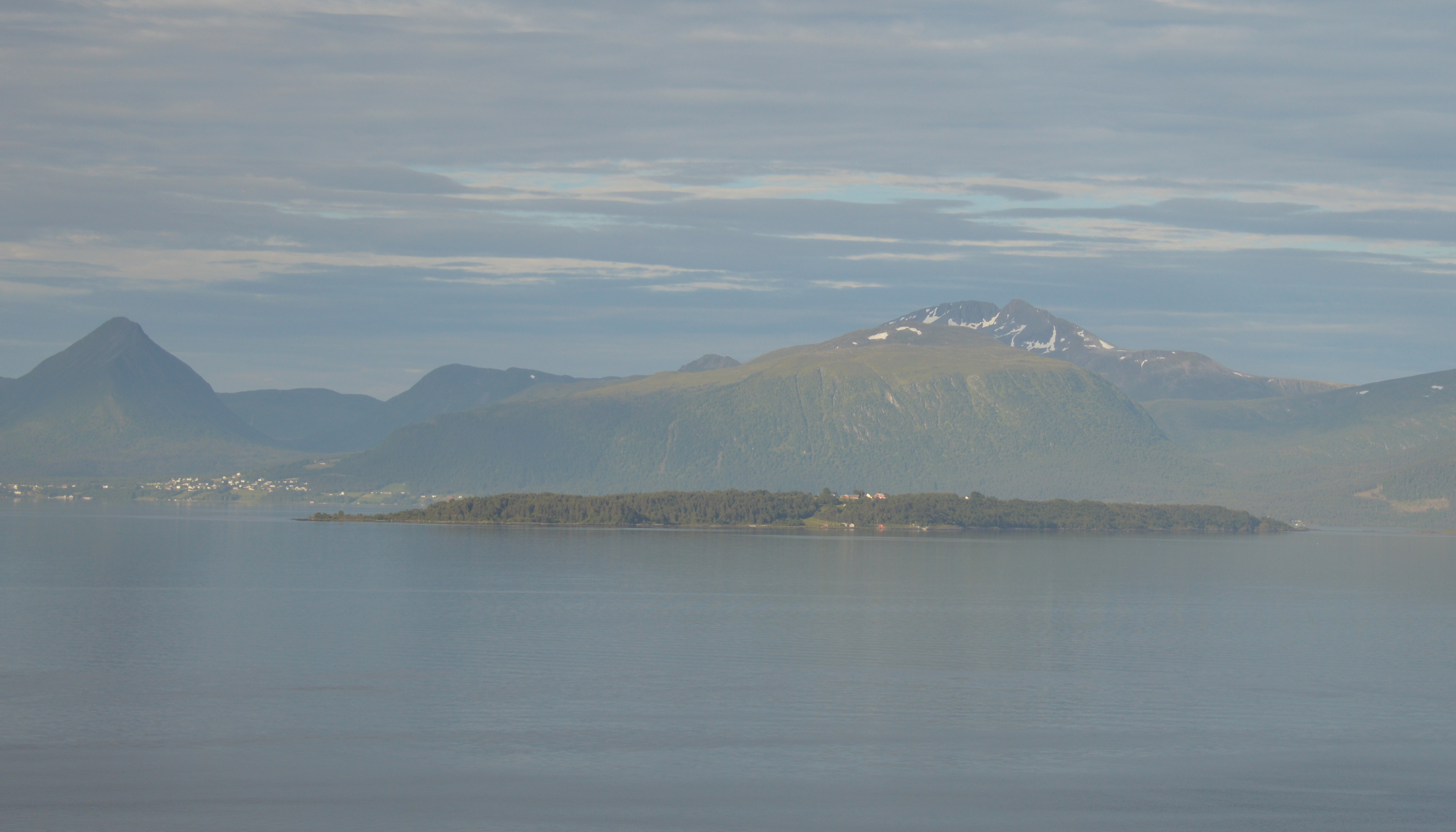 Tautra